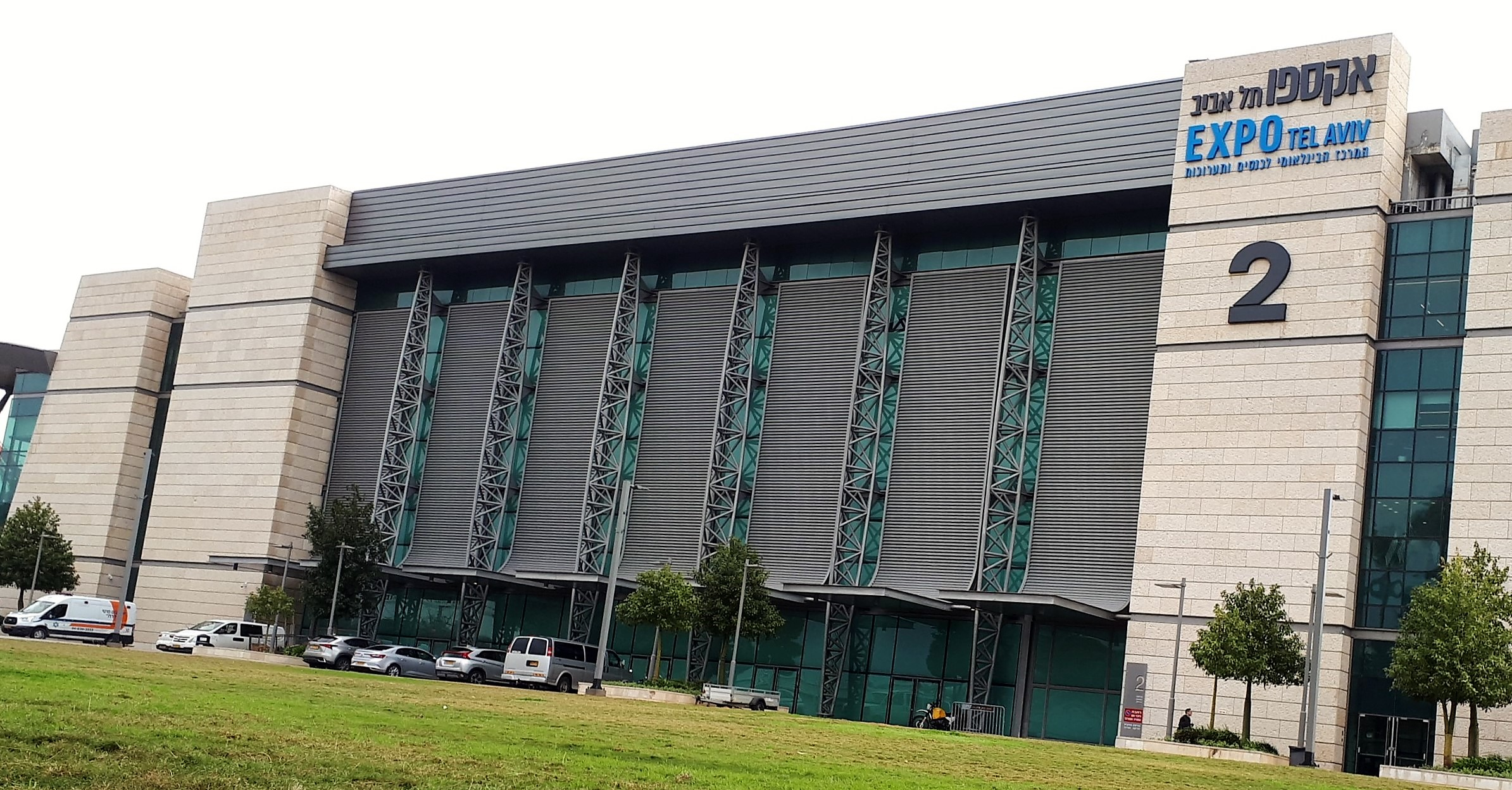 ביתן 2, גני התערוכה, תל אביב, פברואר 2019